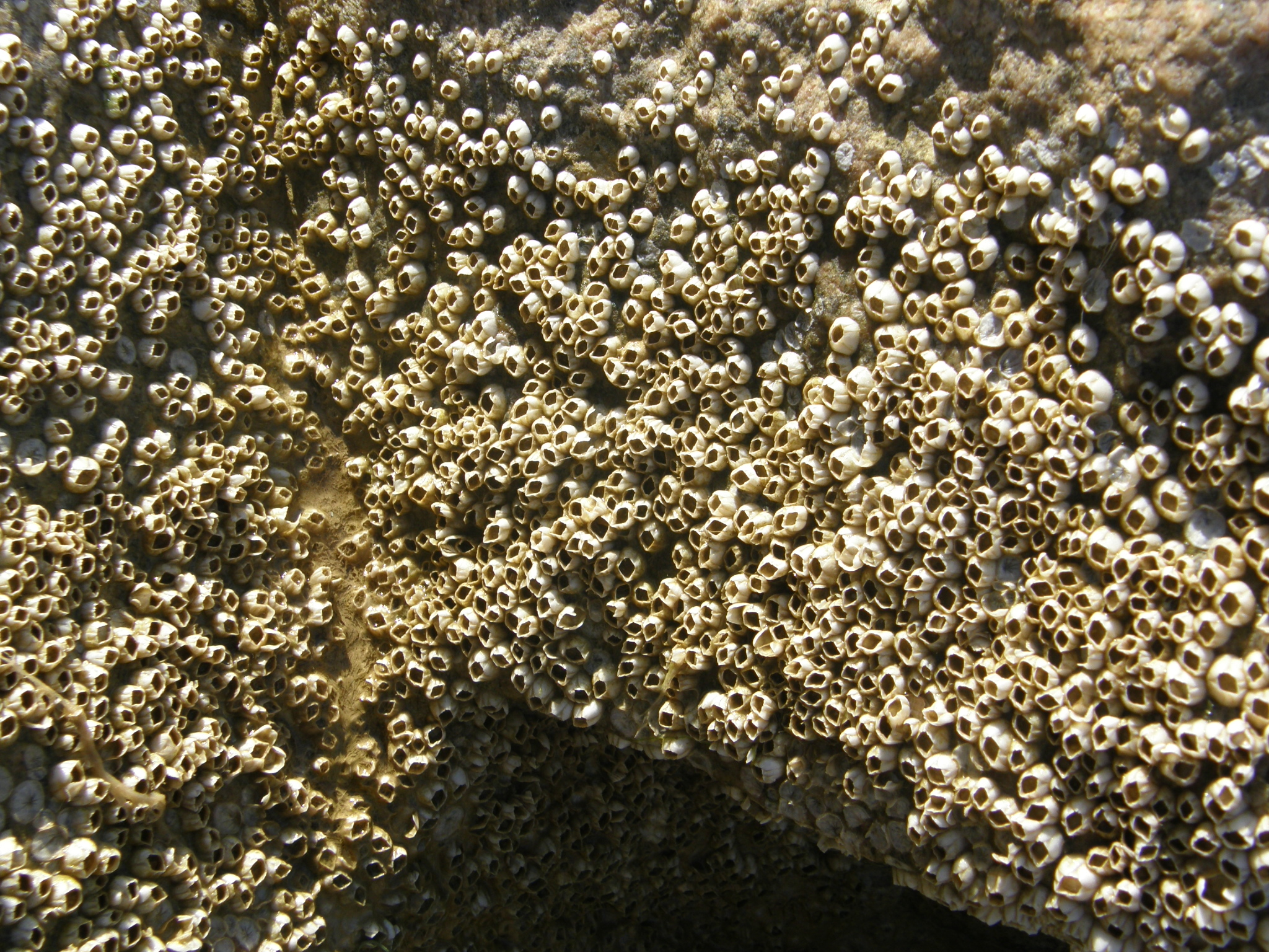 Balanus.